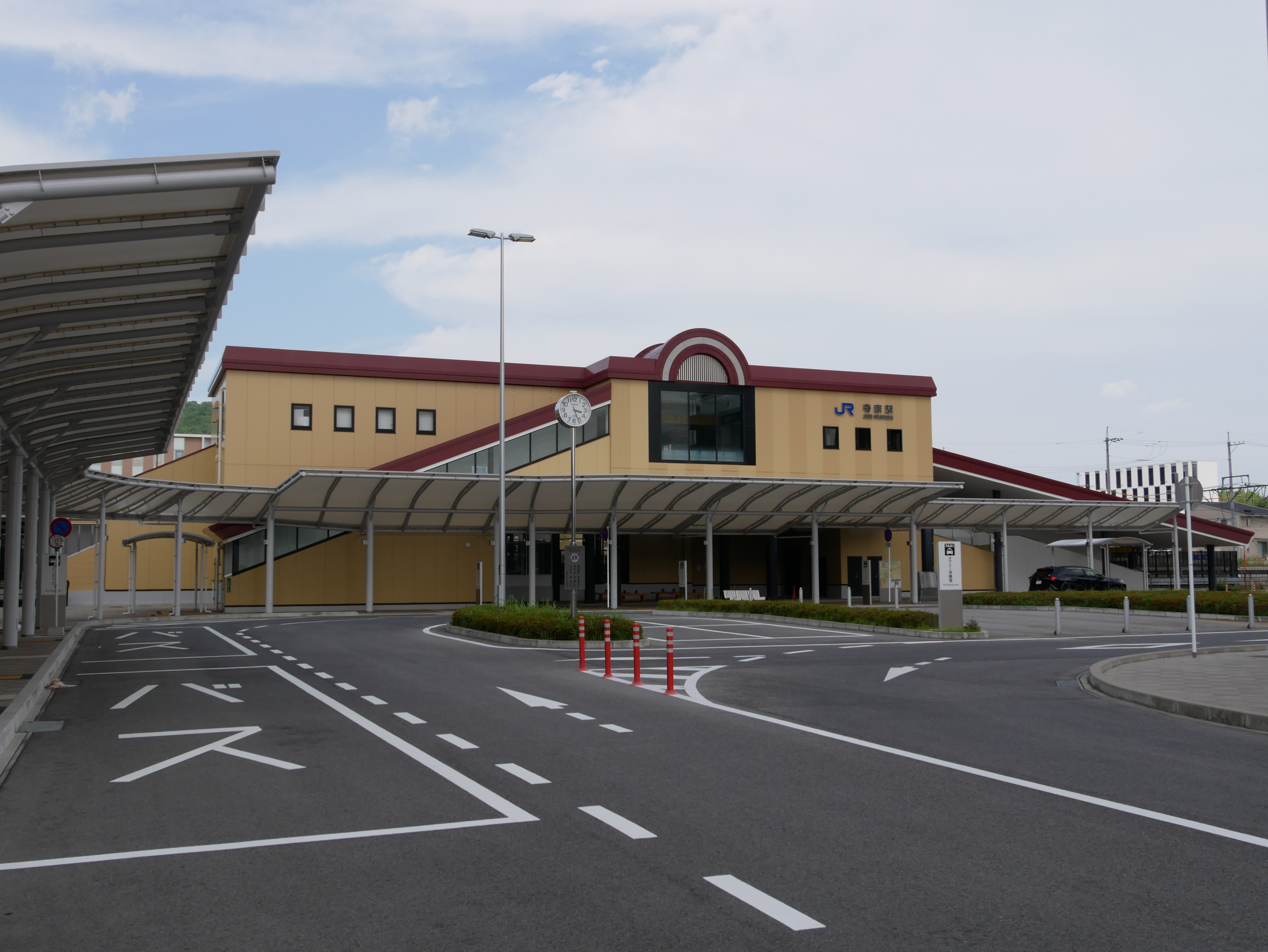 寺家駅南口 2020年6月撮影 Panasonic Lumix DMC-GX7 Mark II